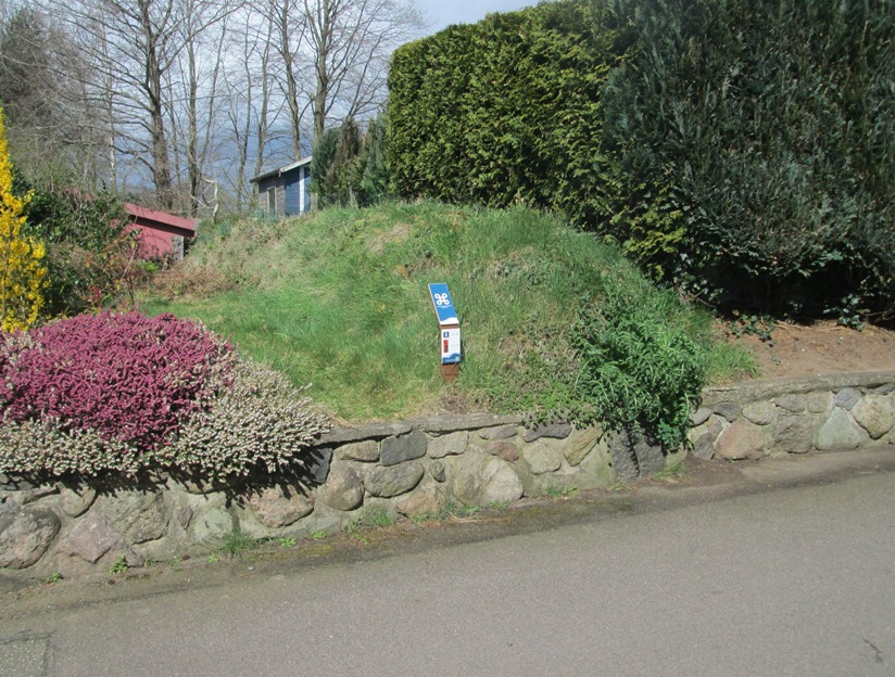 Abschnitt des Osterwalls (Østervold) des Danewerks, belegen in einem Grundstück im Hohlweg (Hulvej) in der Ortschaft Kochendorf (Kokkentorp) nahe Eckernförde